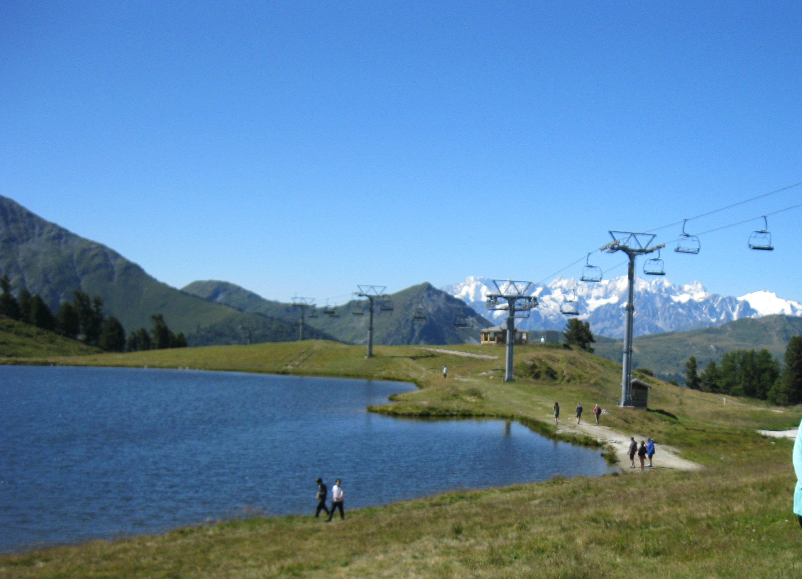 אגם טרקואה